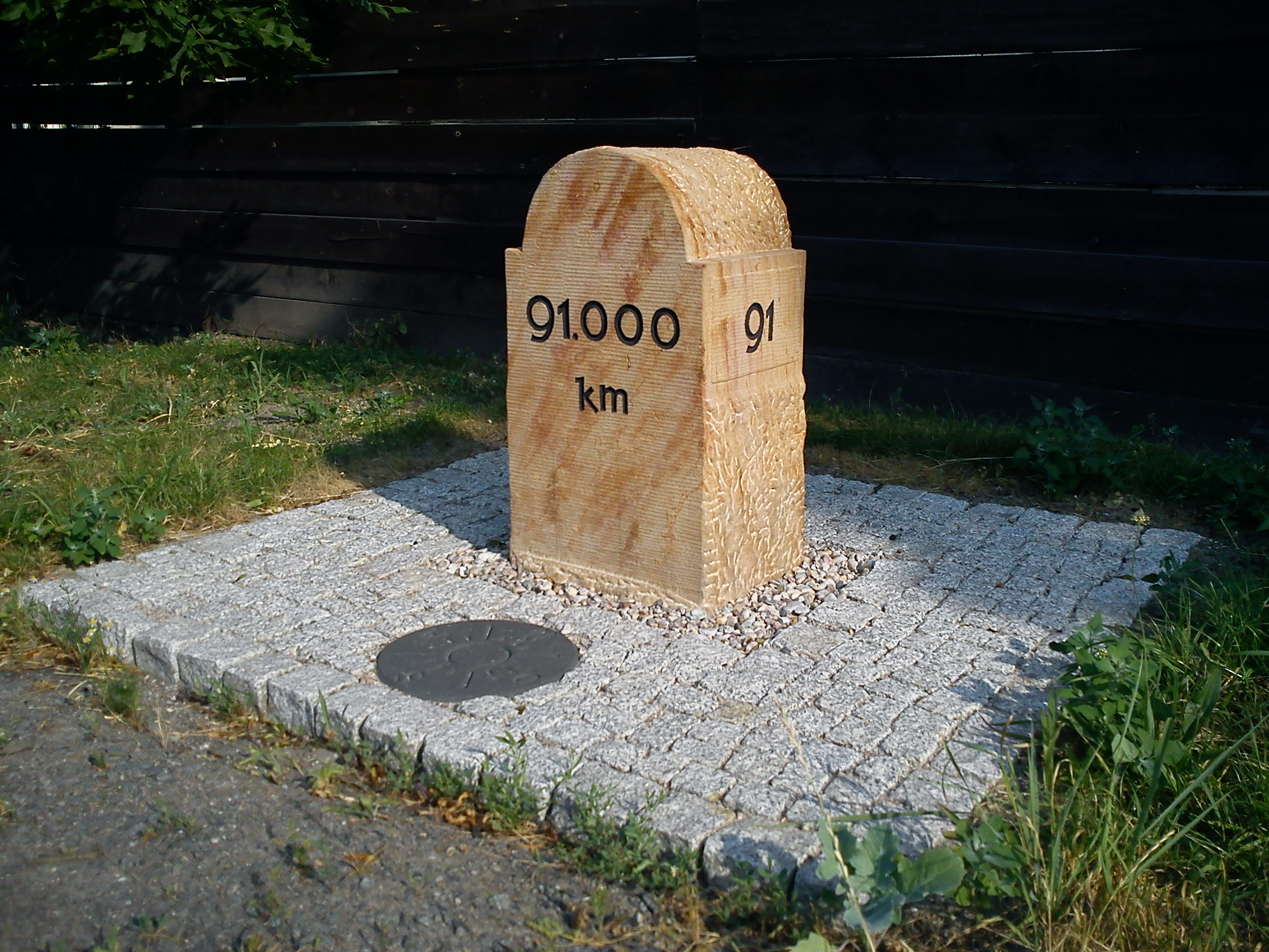 restaurierter Kilometerstein 91,000 an der (alten) B6 am östlichen Ortsausgang von Borsdorf, noch 91 Kilometer bis Dresden